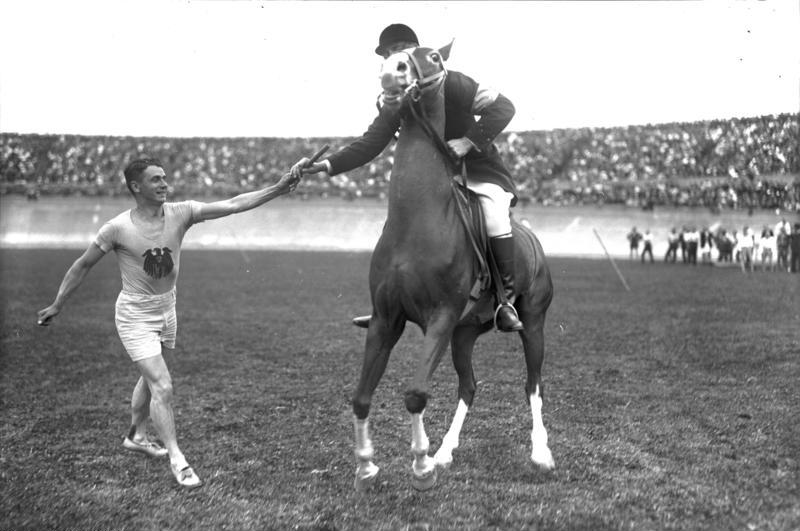 Das große nationale Jubiläums-Sportfest im deutschen Stadion. Das Pushballspiel, welches erstmalig in Deutschland gespielt wurde. Moment aus der gemischten Staffel. Die Staffette wird an einen Reiter weitergegeben.